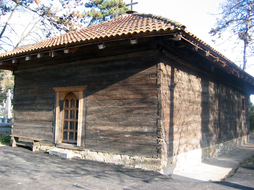 Црква брвнара Светог Илије у Смедеревској Паланци